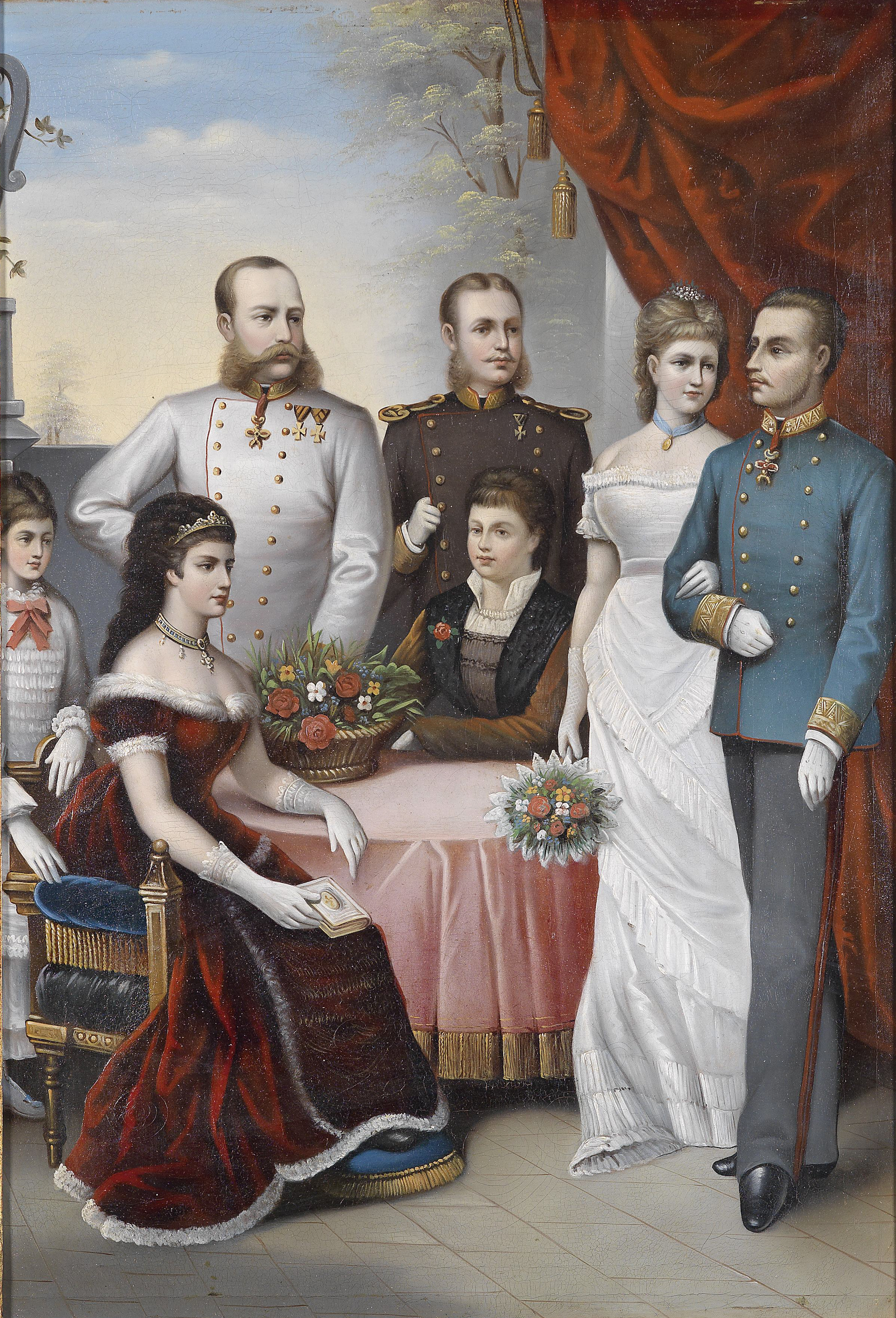 Die kaiserliche Familie um 1882. Gruppenporträt mit Darstellung Kaiser Franz Joseph I., Kaiserin Elisabeth, Kronprinz Rudolf mit seiner Gemahlin Kronprinzessin Stephanie, Erzherzogin Gisela mit ihrem Gemahl Prinz Leopold von Bayern und Erzherzogin Marie Valerie, Öl auf Leinwand, 60 x 45 cm